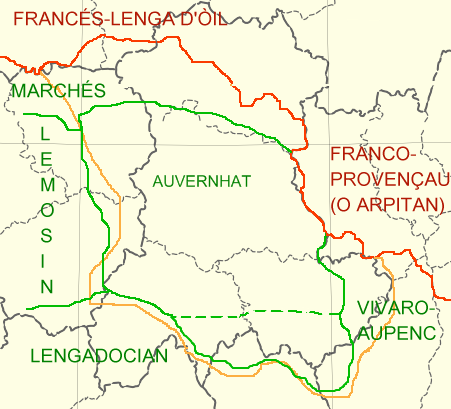 Définition de l'auvergnat selon différents linguistes.